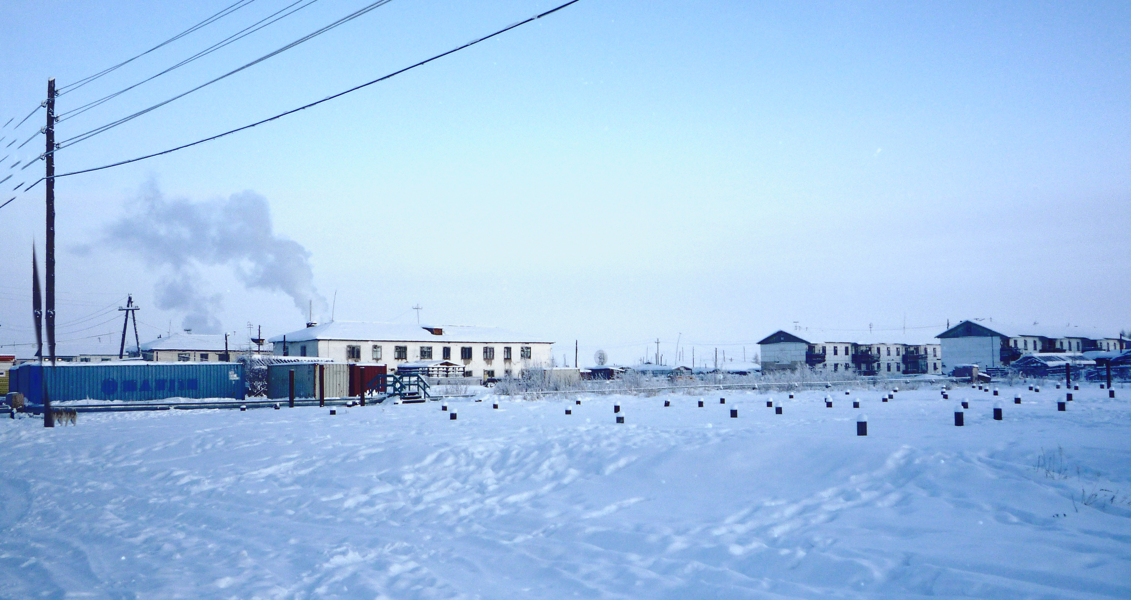 Село Омолон